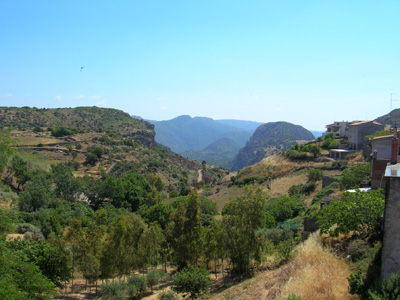 Scorcio del luogo, Pupina